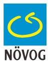 Altes Logo von NÖVOG